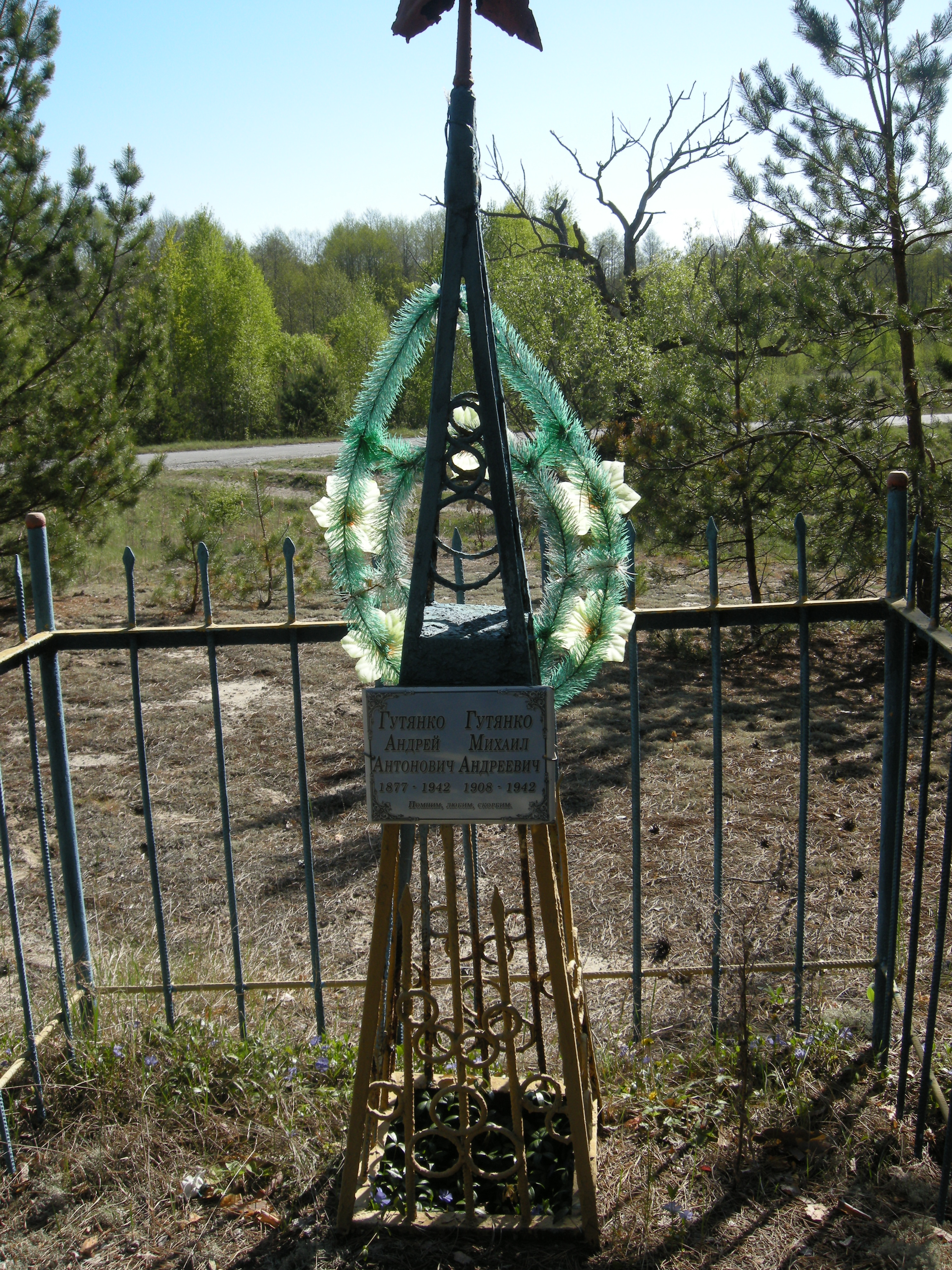 могили на місці хутора Каплиця